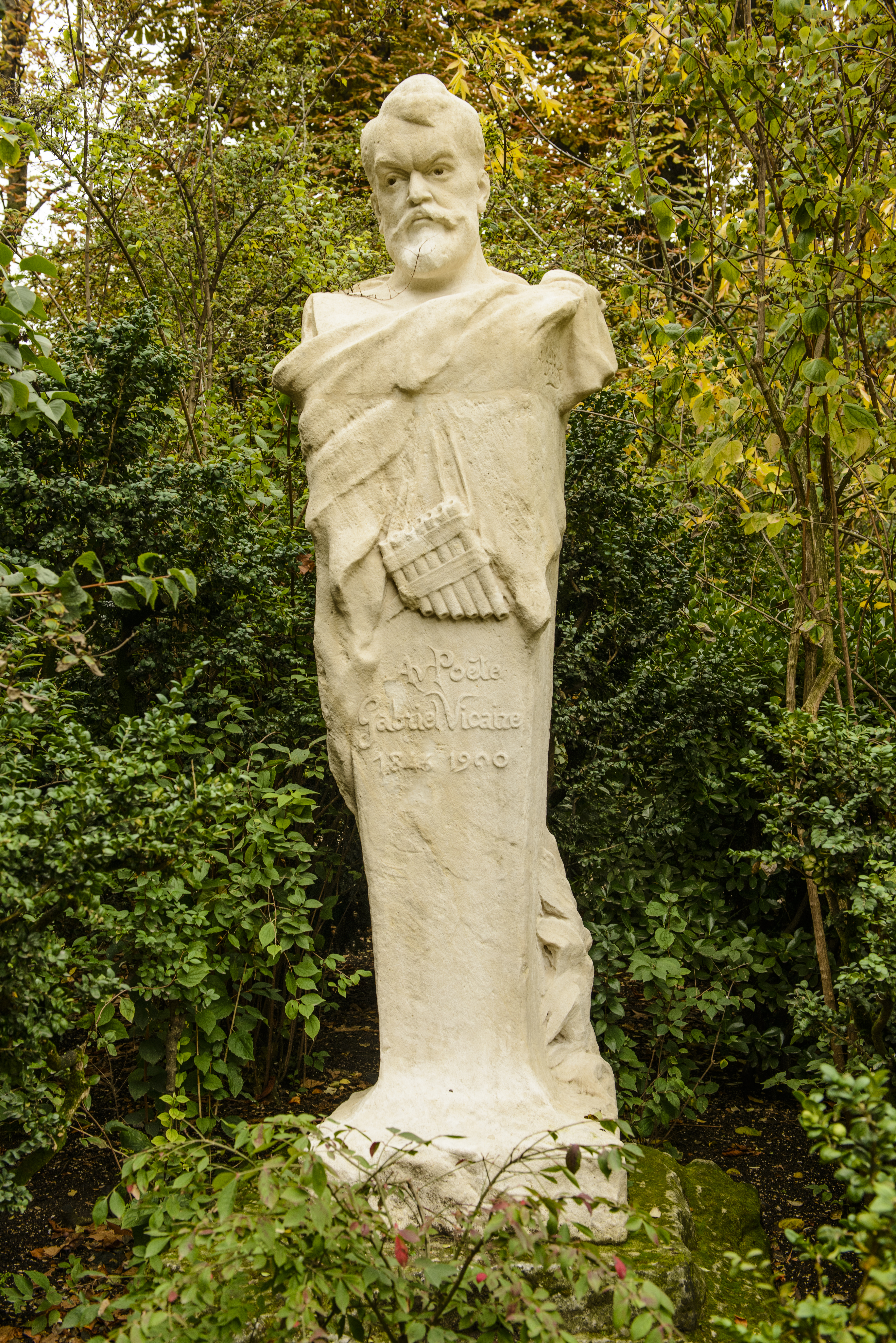 Buste du poète Gabriel Vicaire, 1848-1900